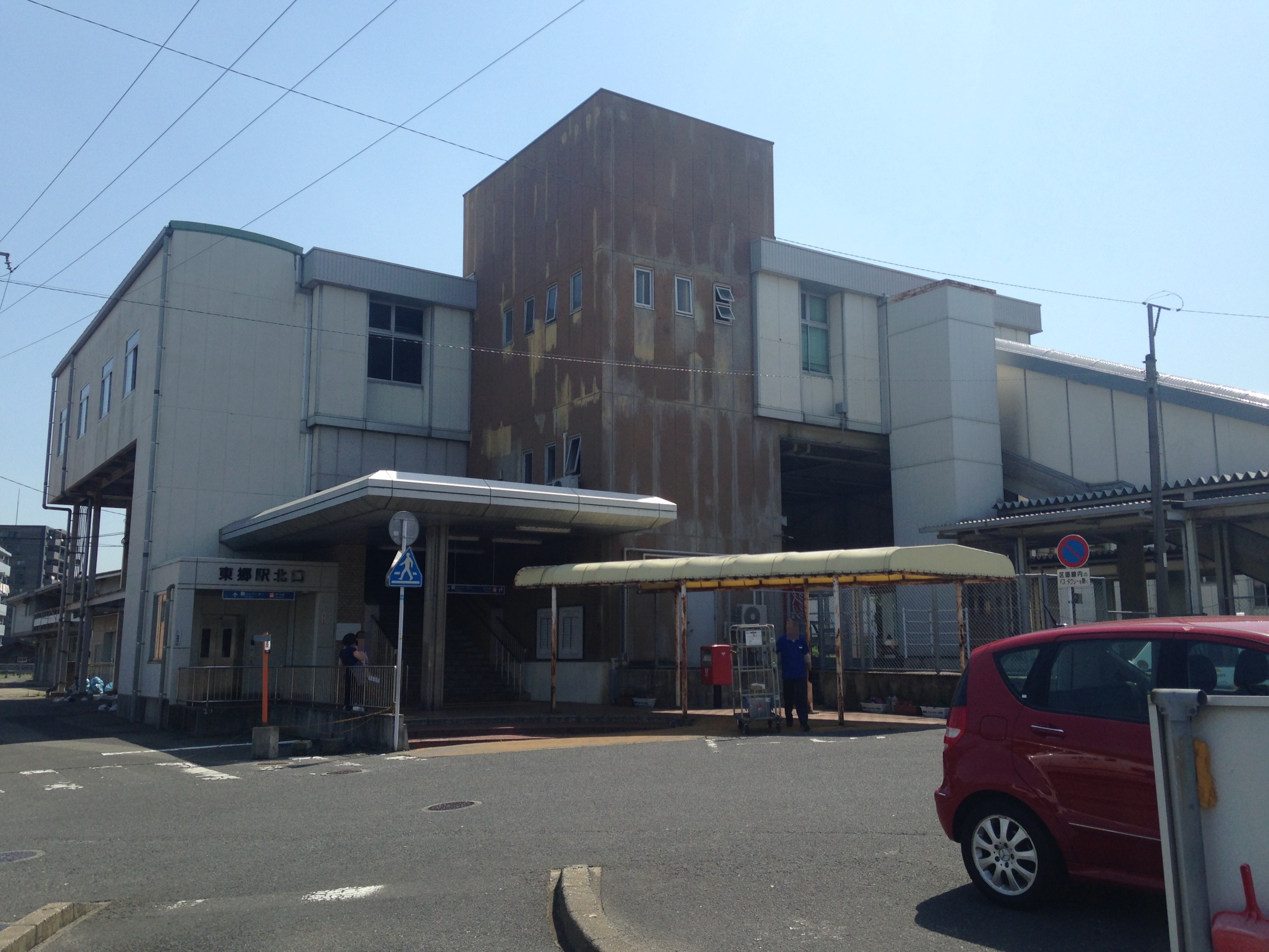 東郷駅駅舎